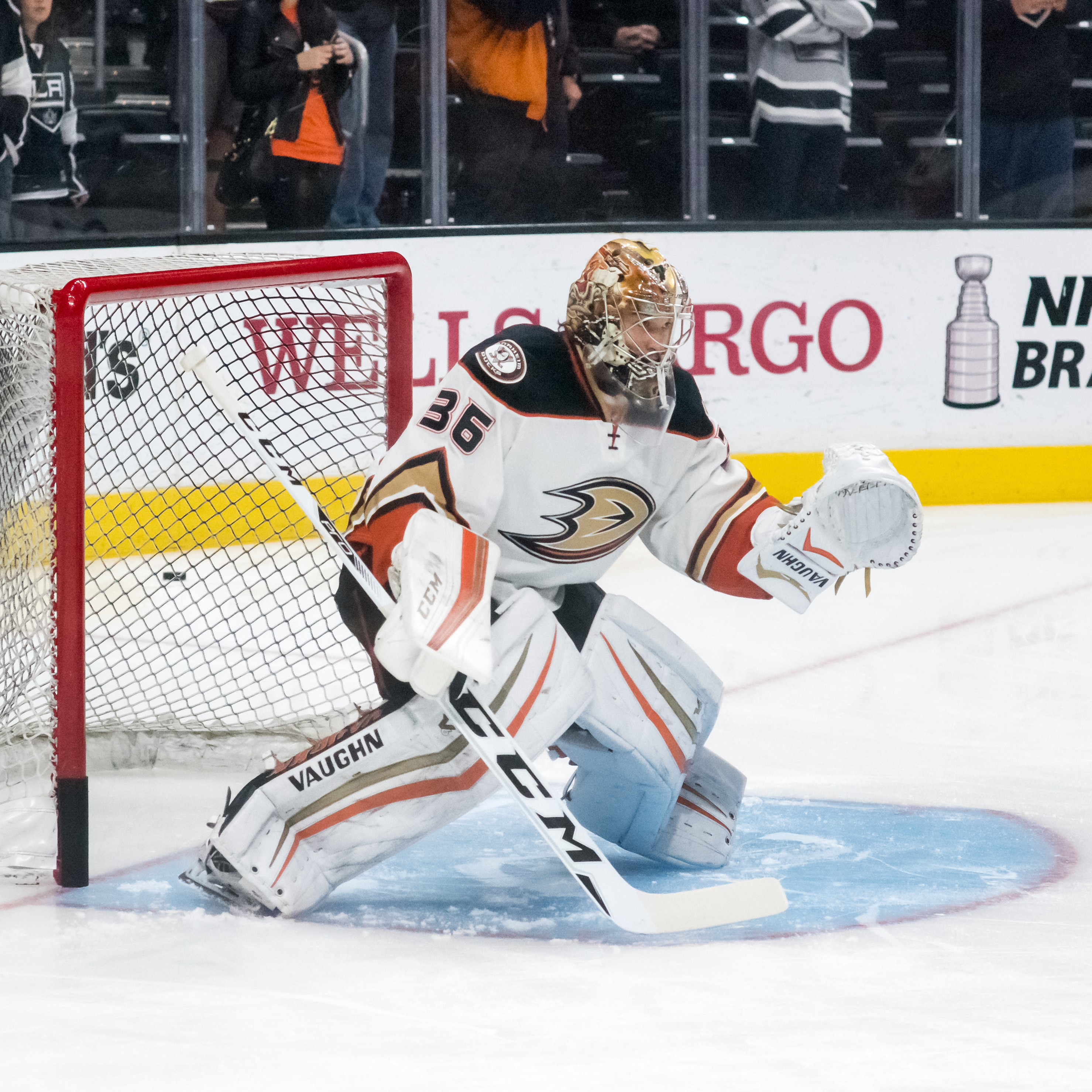 John Gibson